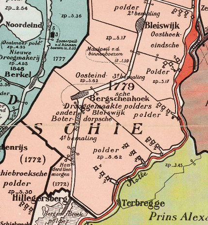 polders onder Bleiswijk